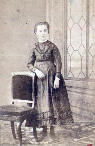 Vitalie Rimbaud (1858-1875), sorella di Arthur